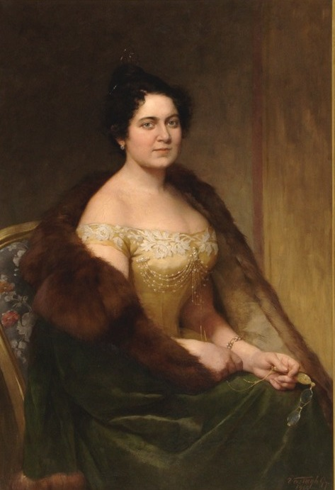 Nagy Bella színésznő. Jókai Mór második felesége.